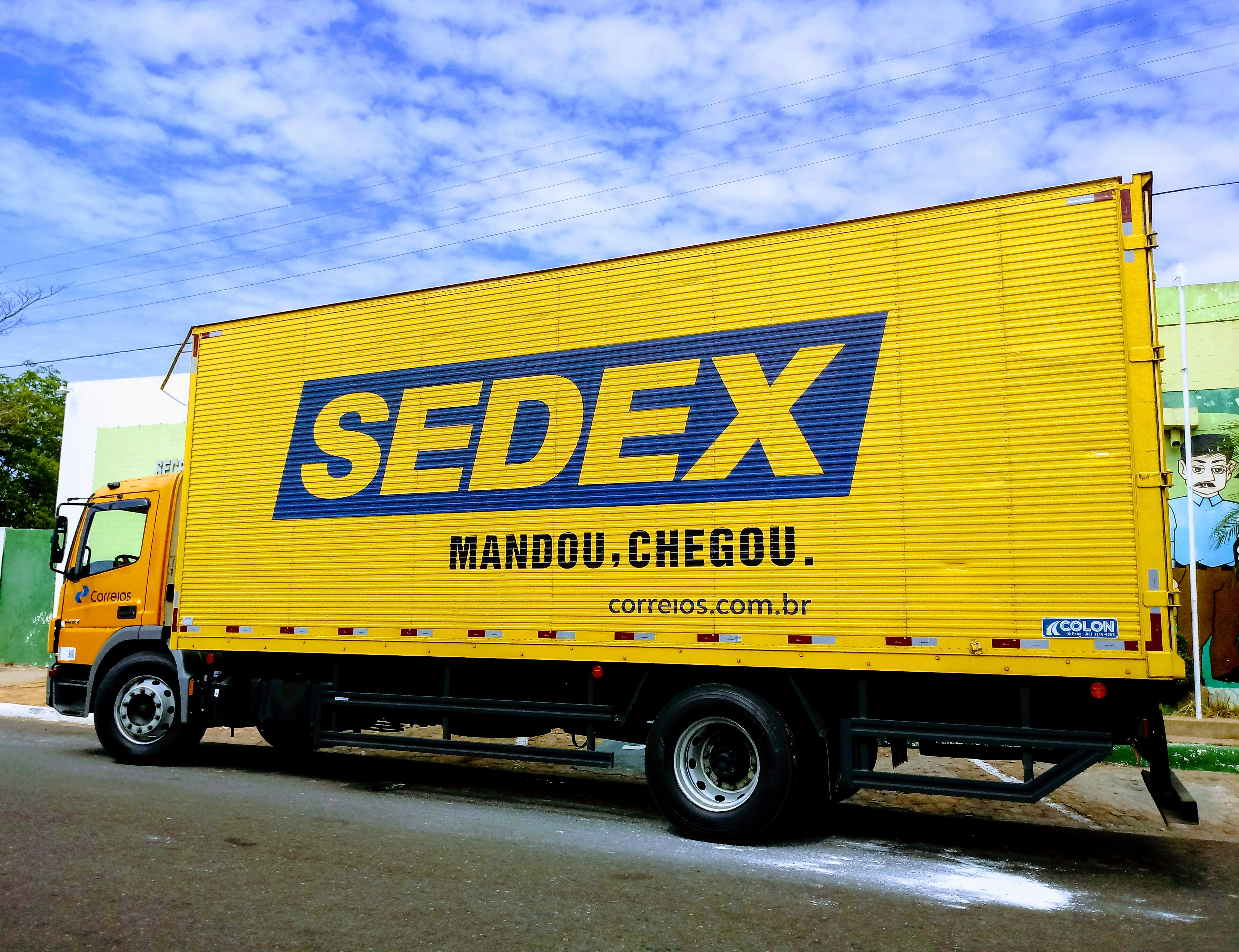 Carro do Sedex do Brasil.